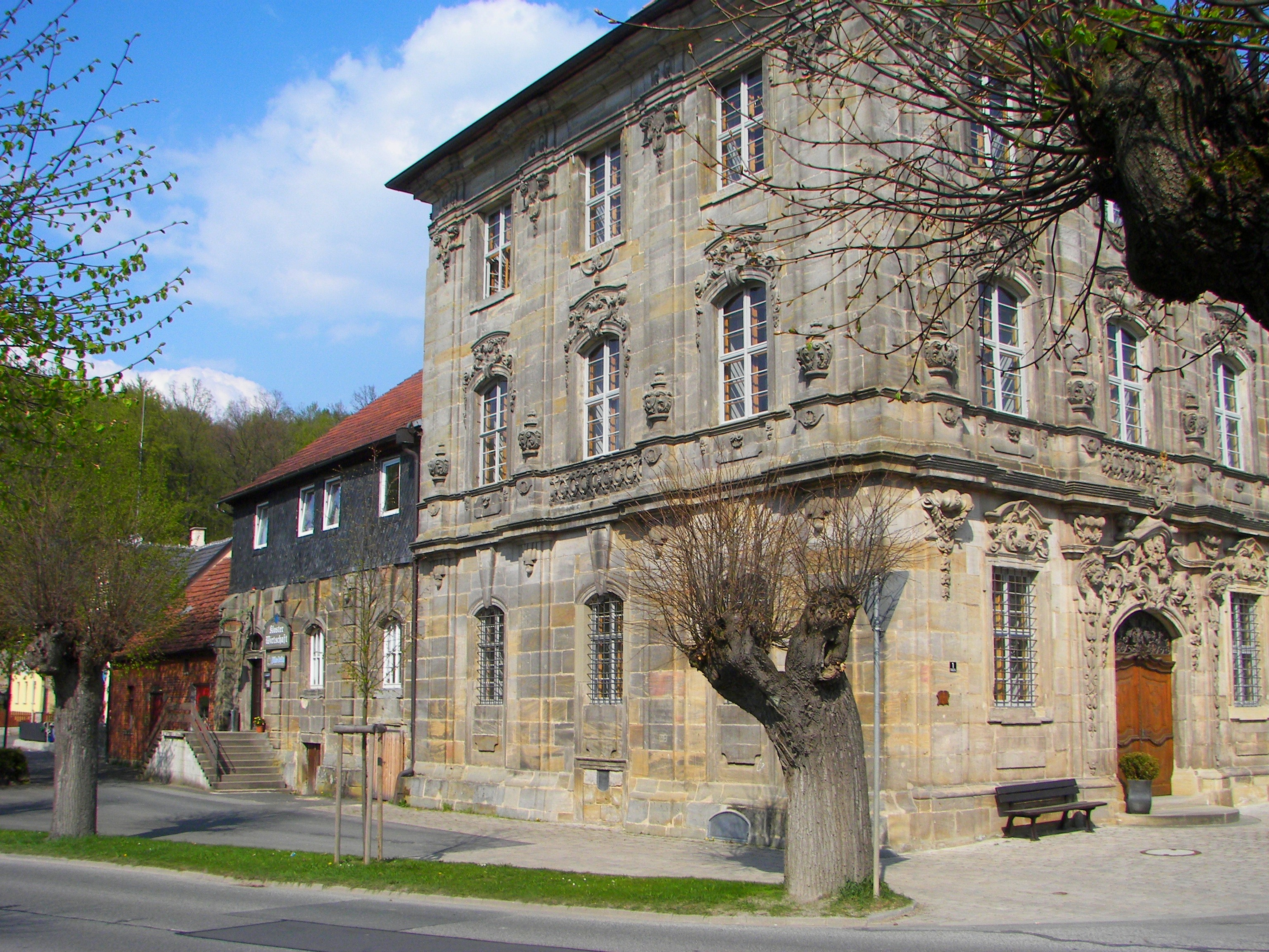 Der Konventbau in Kloster Langheim